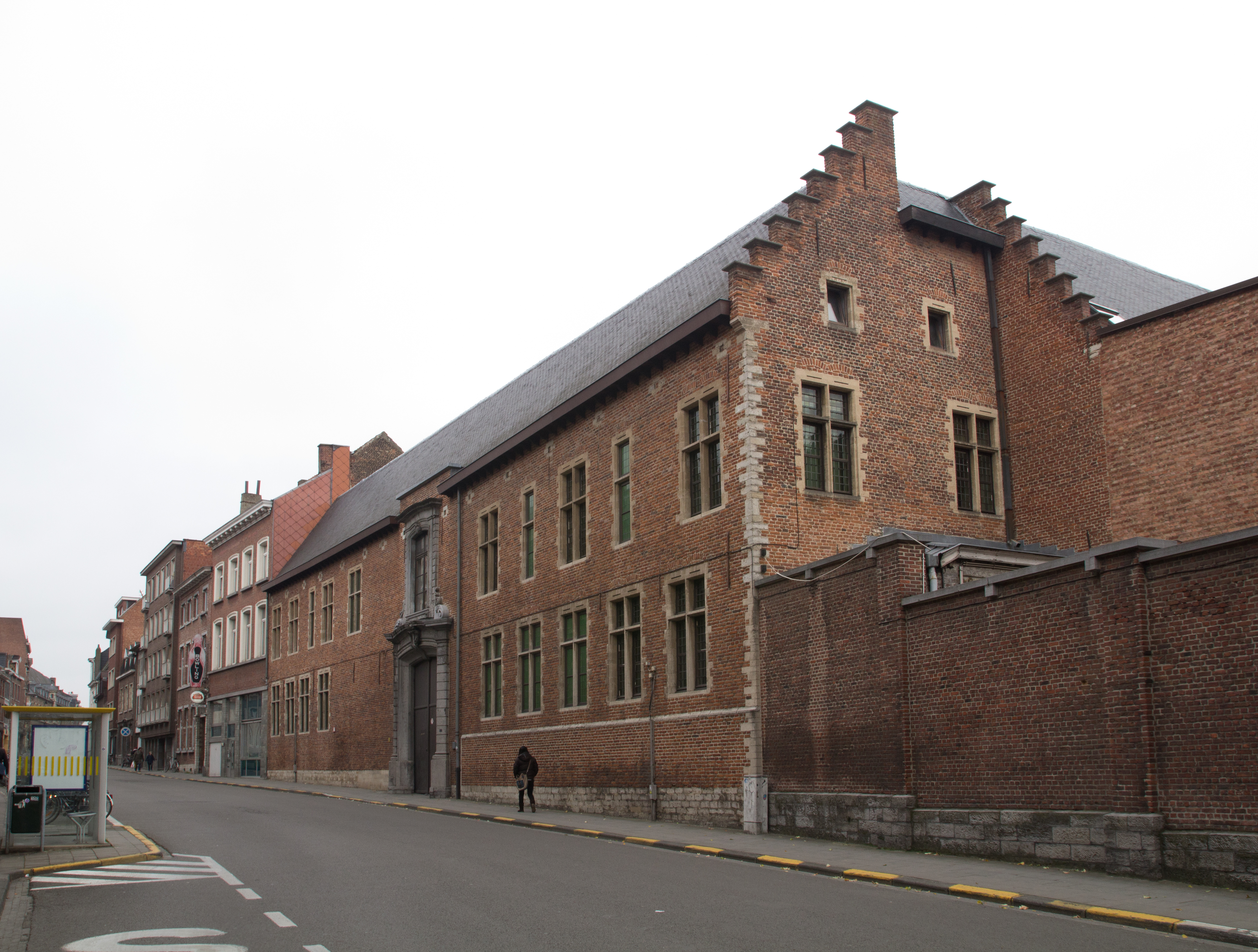 Vigliuscollege, Leuven